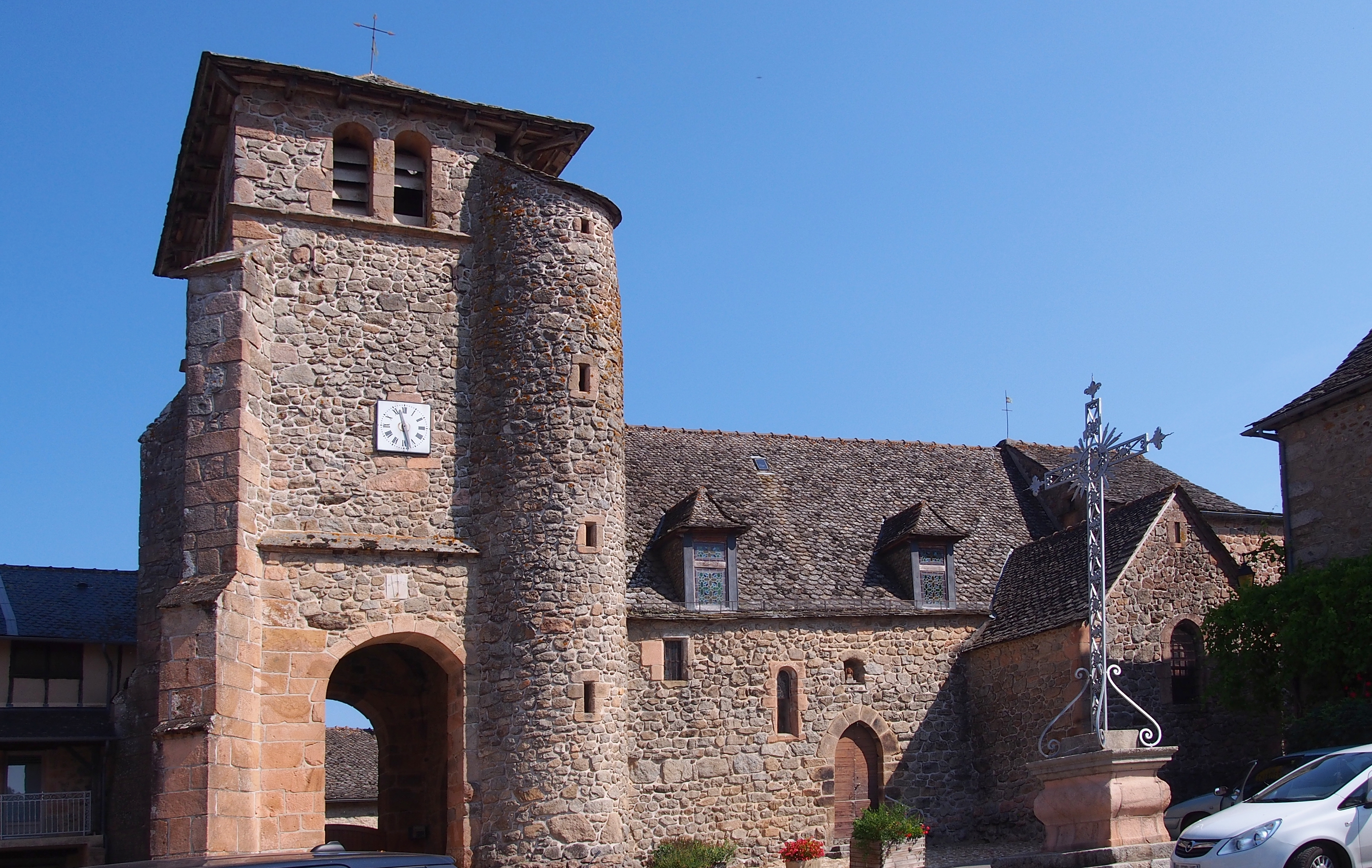 La Bastide-l'Évêque (Occitanie, France). L'église Saint-Jean-Baptiste.